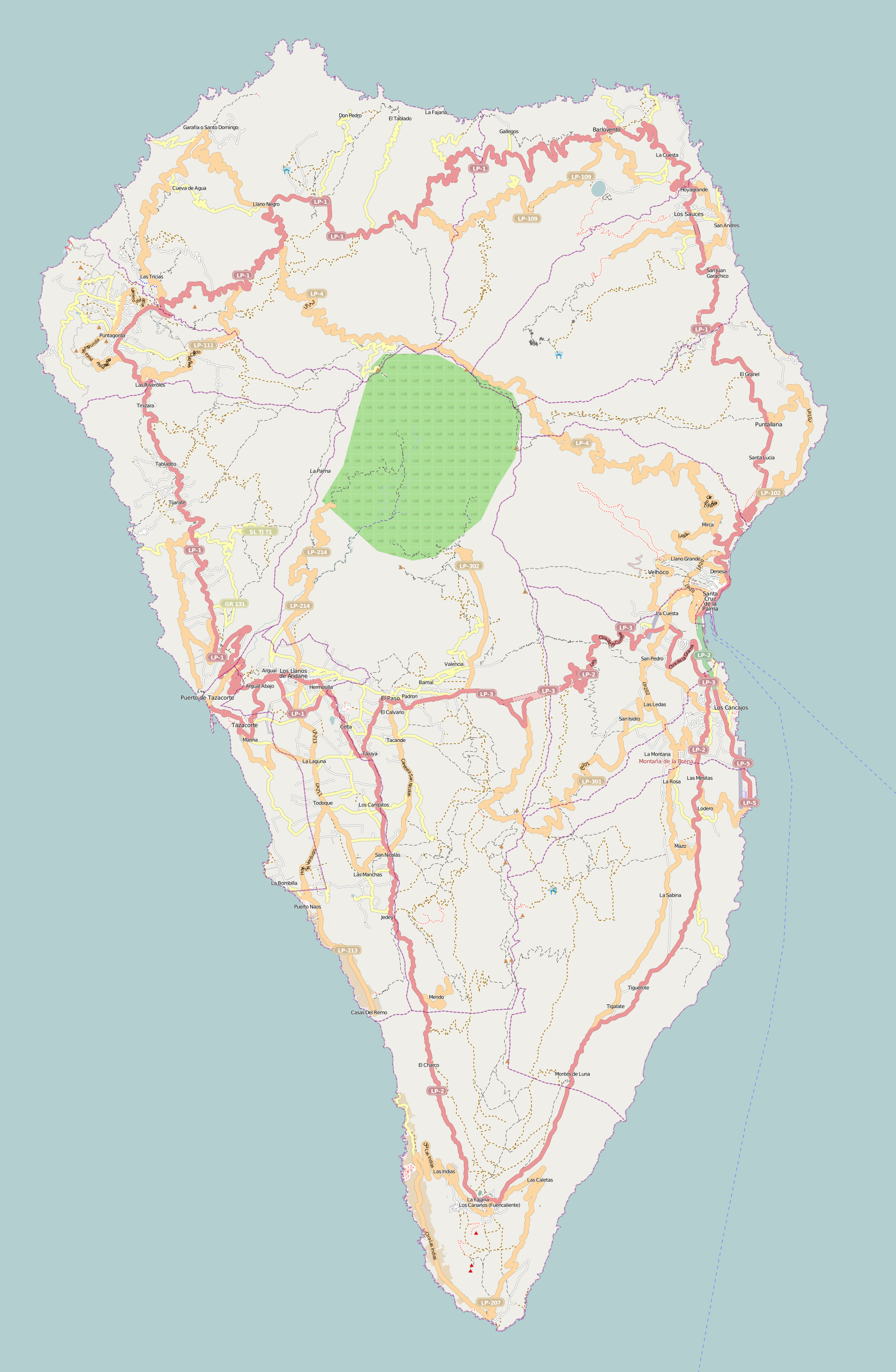 Carte de La Palma (Îles Canaries).